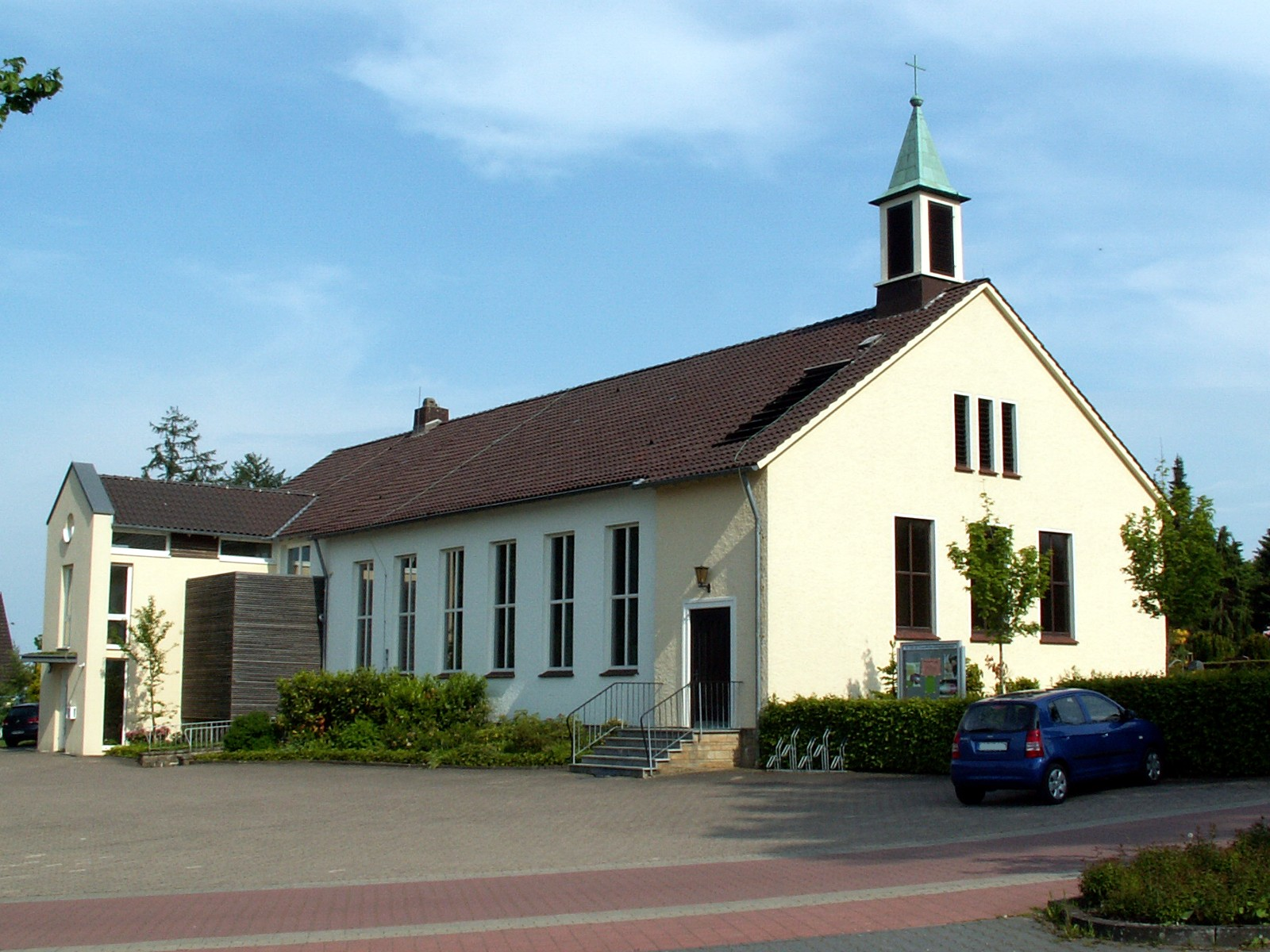 ev. Waldkirche St. Lukas in Melle, Stadtteil Bruchmühlen, Ortsteil Bennien, Ansicht von Nordwesten